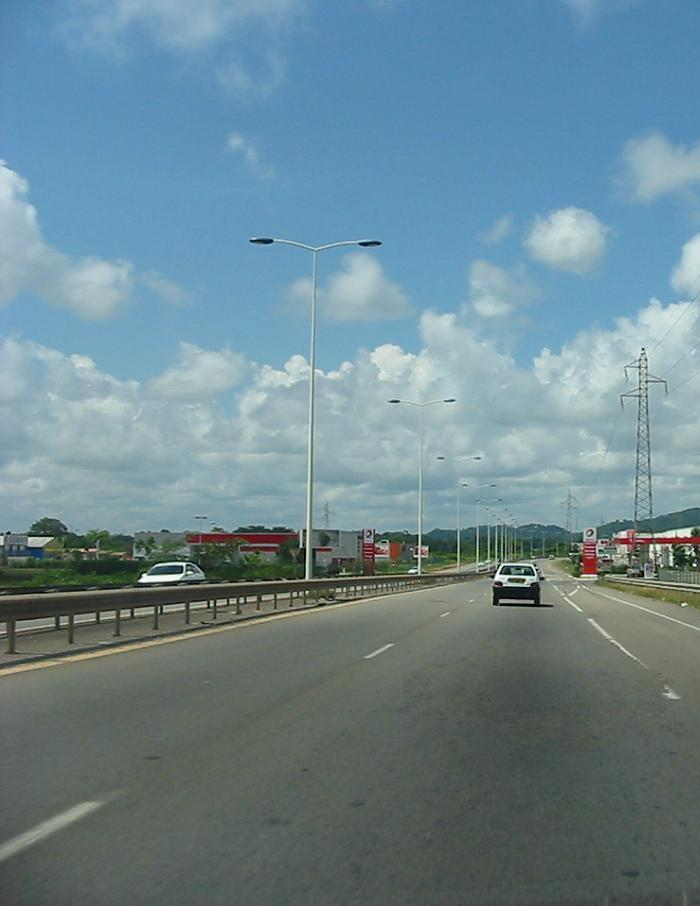 RN1 entre le rond-point des Maringouins et le rond-point Balata Source:auteur Didwin